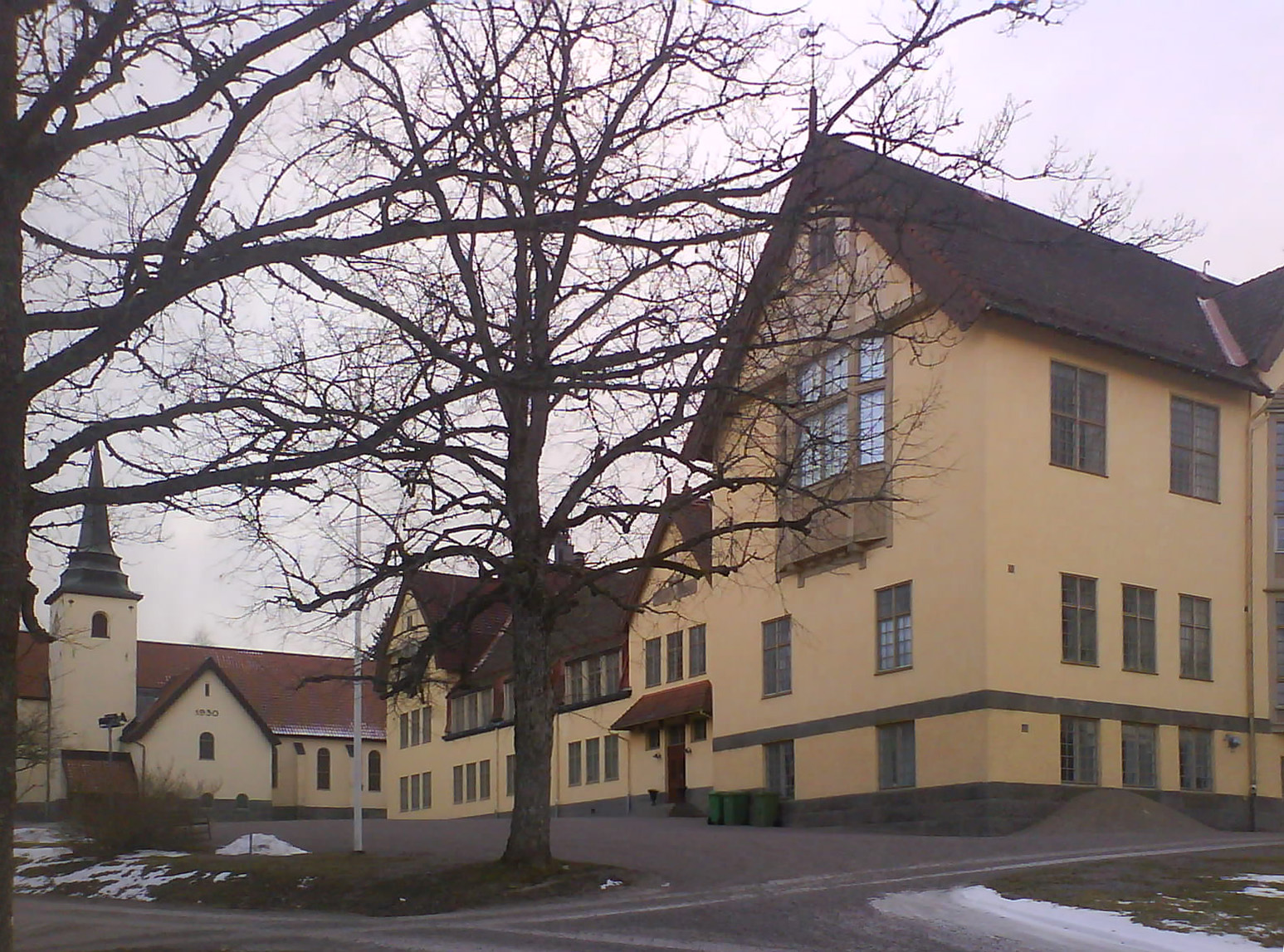 Lundsbergs skola. Byggnadsår 1906. Arkitekt Erik Lallerstedt. Lundsbergs kyrka. Byggnadsår 1929-30. Arkitekt Bror Almquist